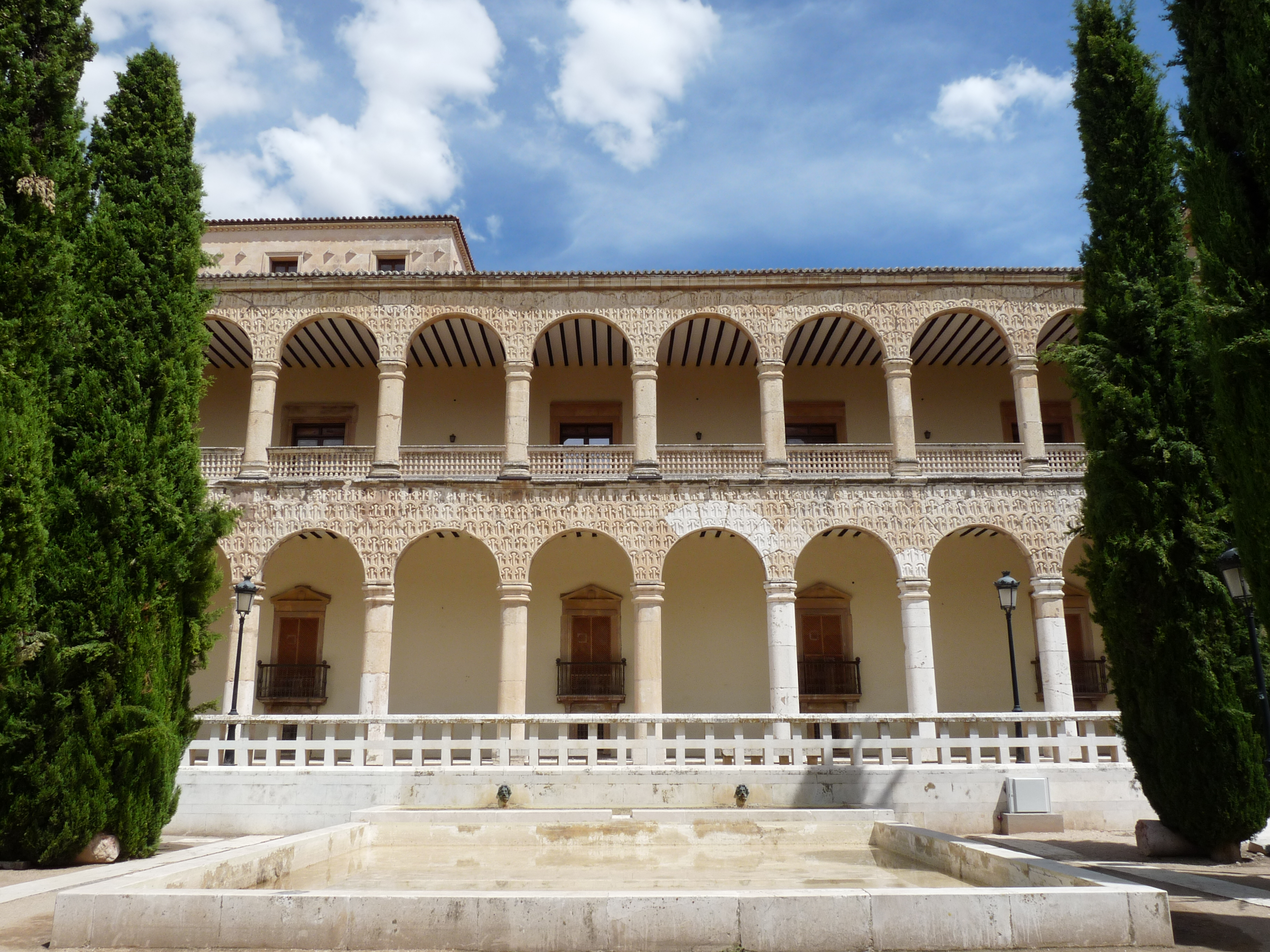 Buitenkant van de Palacio del Infantado gezien vanaf de tuin